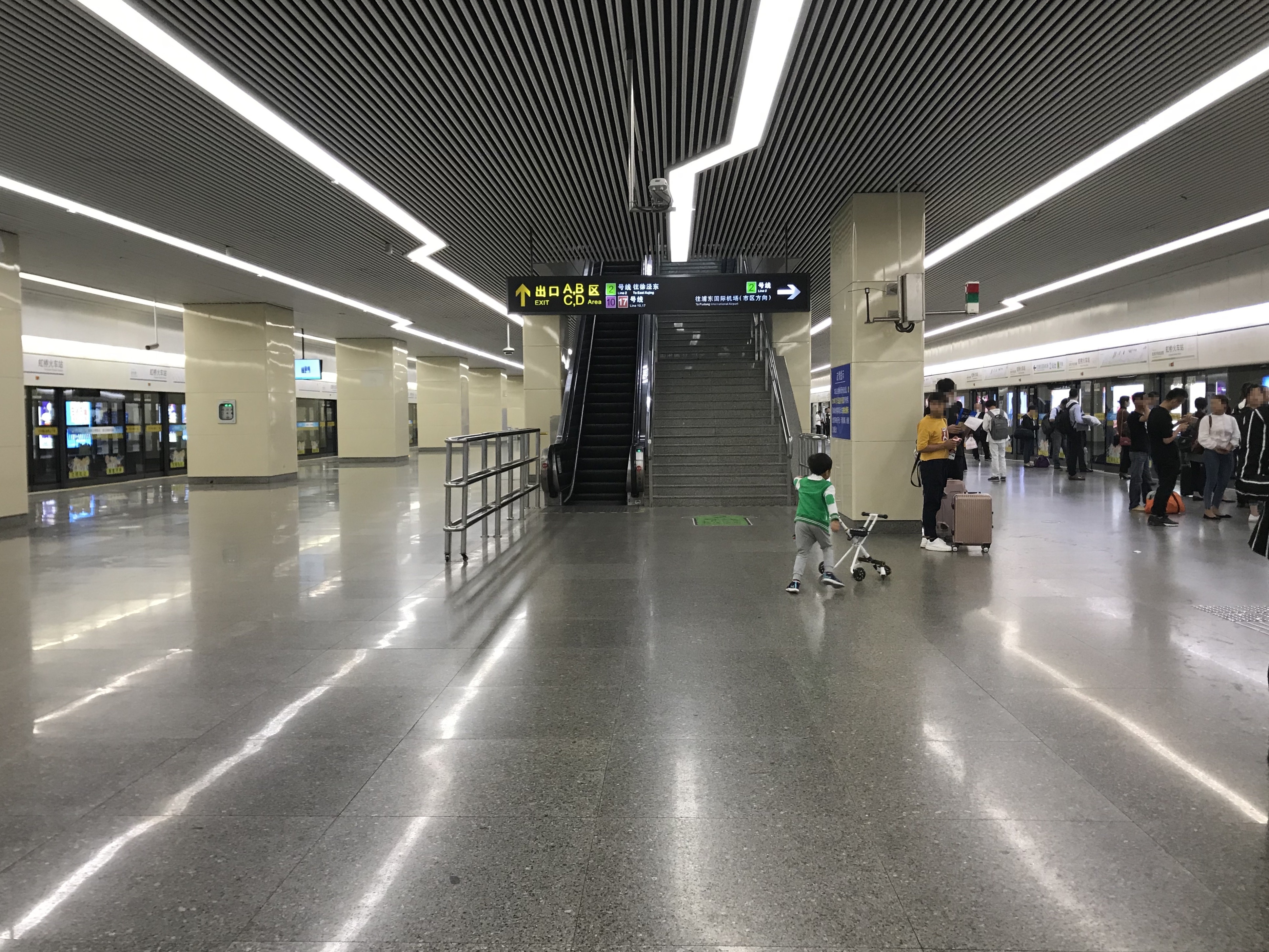 虹橋駅駅(上海地下鉄)のホーム。左側は17号線、右側は2号線